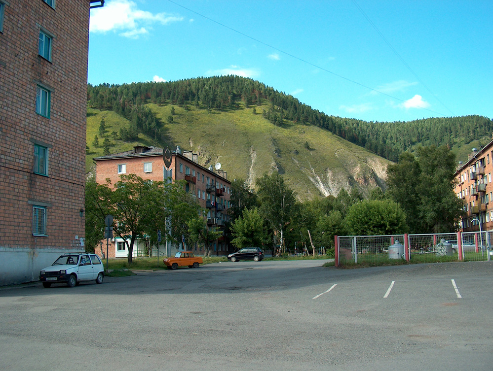 Центр города